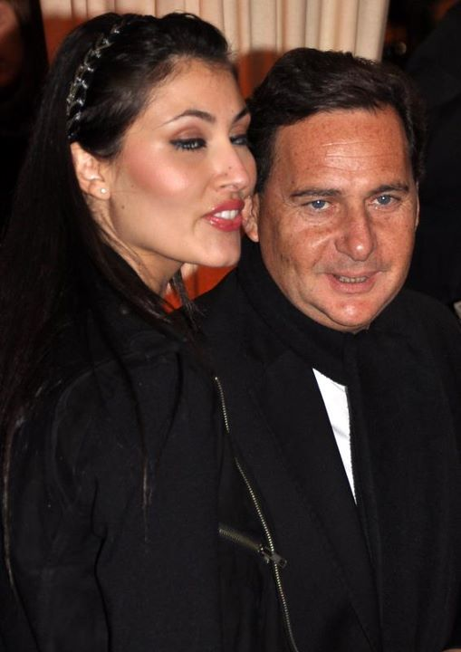 Eric Besson et son épouse Yasmine Tordjman à l'avant-première du film Carnage